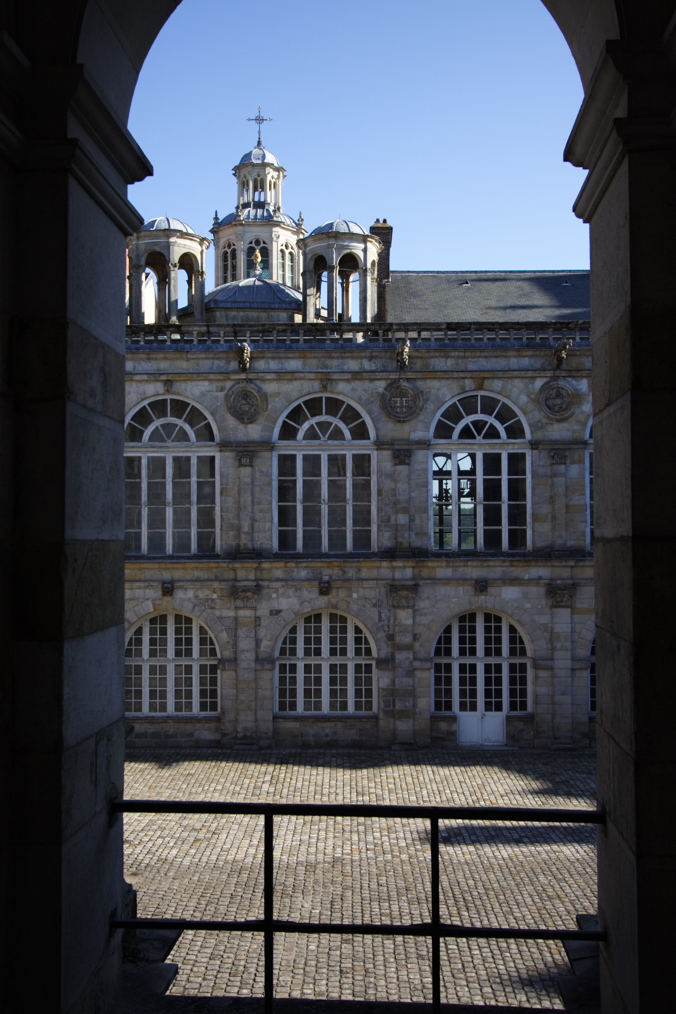 Château de Fontainebleau(Fontainebleau, France)